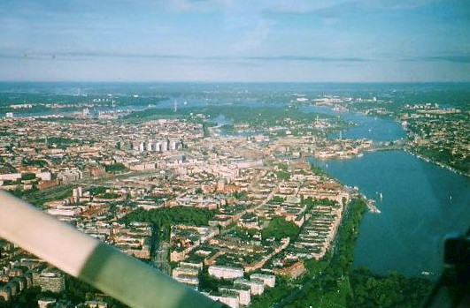 Sydöstra Kungsholmen fångat på bild 2001. Fotograf: Användare:Supernissen